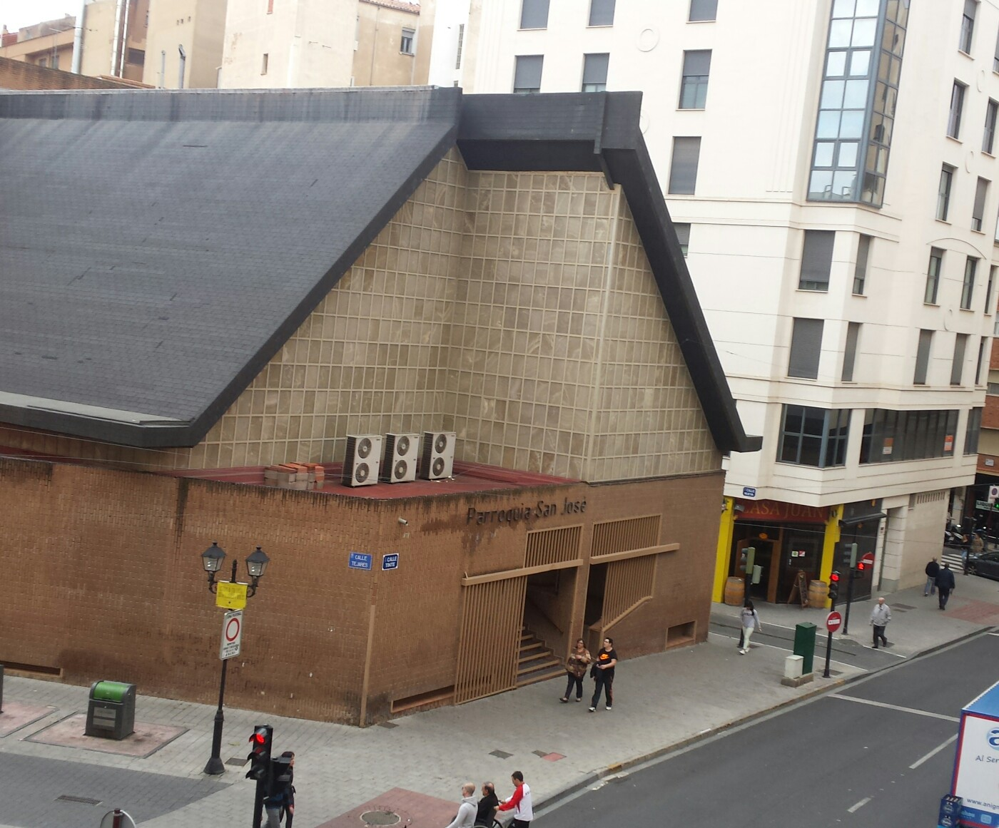 Iglesia de San José. Plaza de San José. Albacete